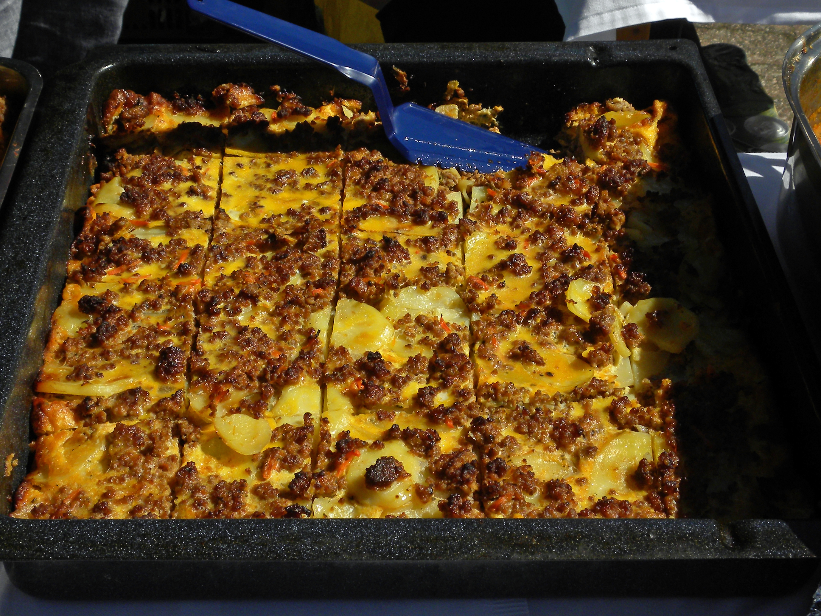 Spezialitäten aus der Makedonischen Küche - angeboten vom Makedonischen Folkloreverein "Makedonia" beim Wasserweltfest 2012 im Vogelweidpark in Wien Rudolfsheim-Fünfhaus